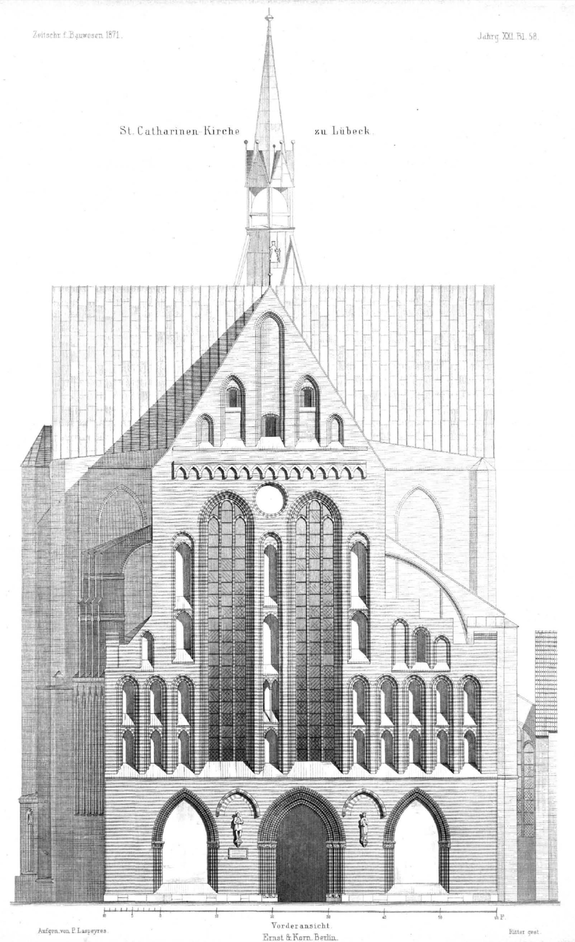 Vorderansicht der Katharinenkirche